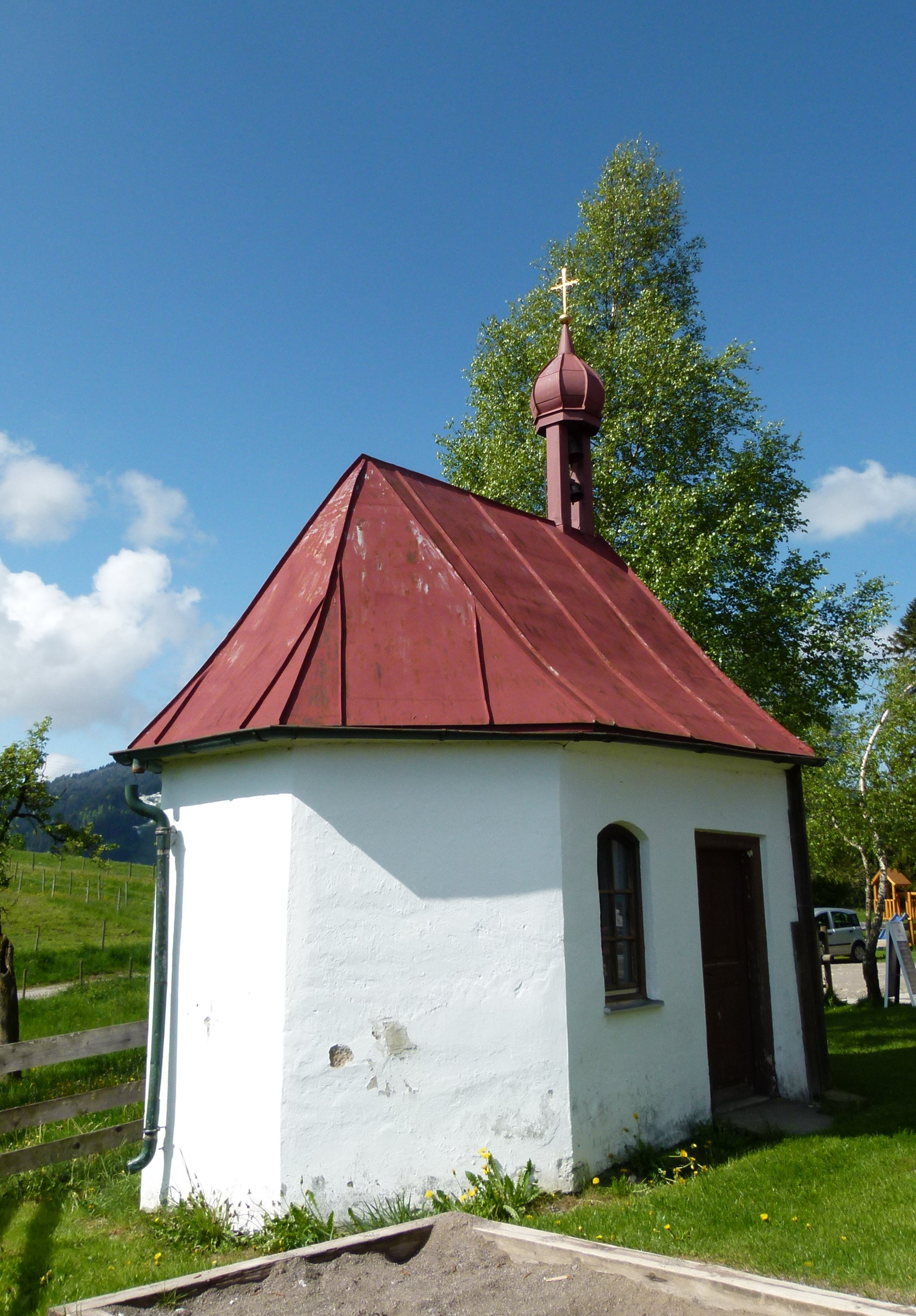 Kapelle bei der Alpe Kögelhof in Eisenberg (Allgäu)